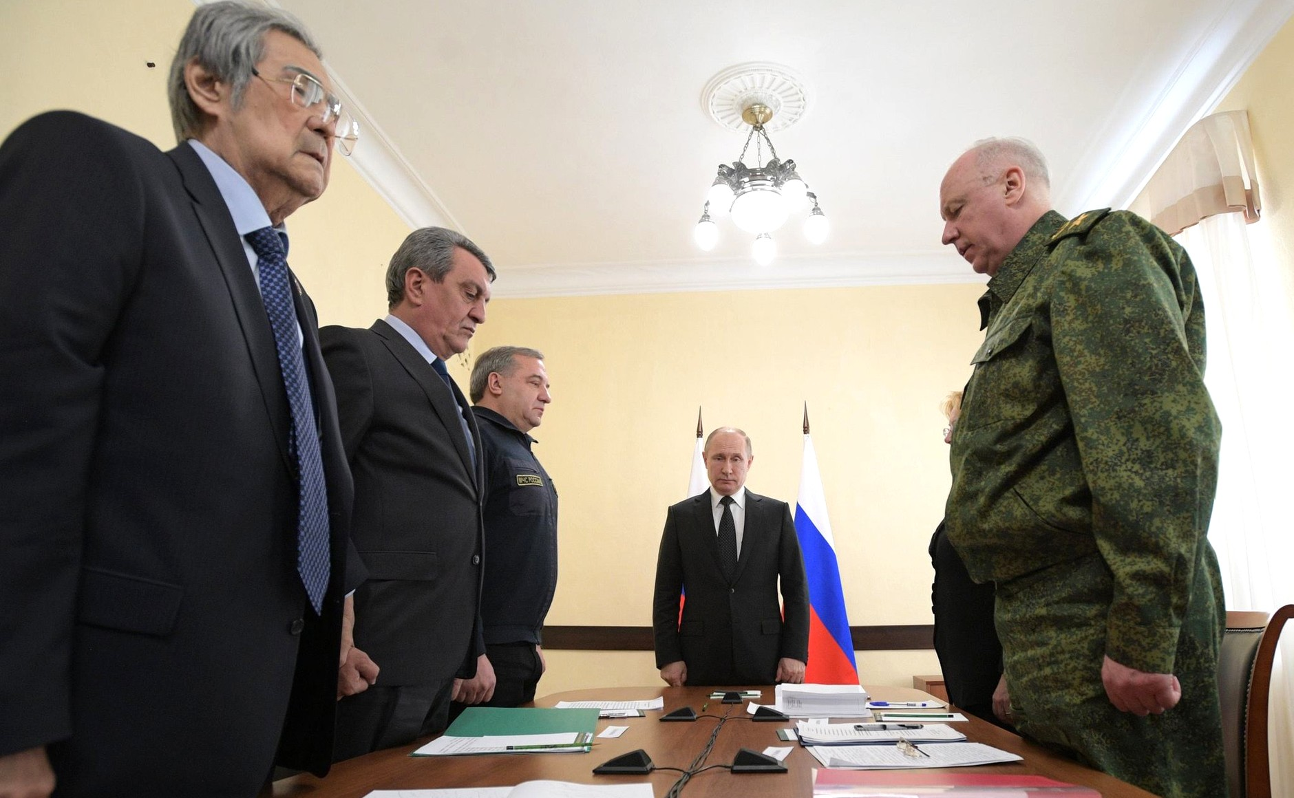 Президент провёл в Кемерове совещание с главой МЧС Владимиром Пучковым, Министром здравоохранения Вероникой Скворцовой и председателем Следственного комитета Александром Бастрыкиным. Участники совещания почтили память погибших при пожаре в Кемерове минутой молчания.